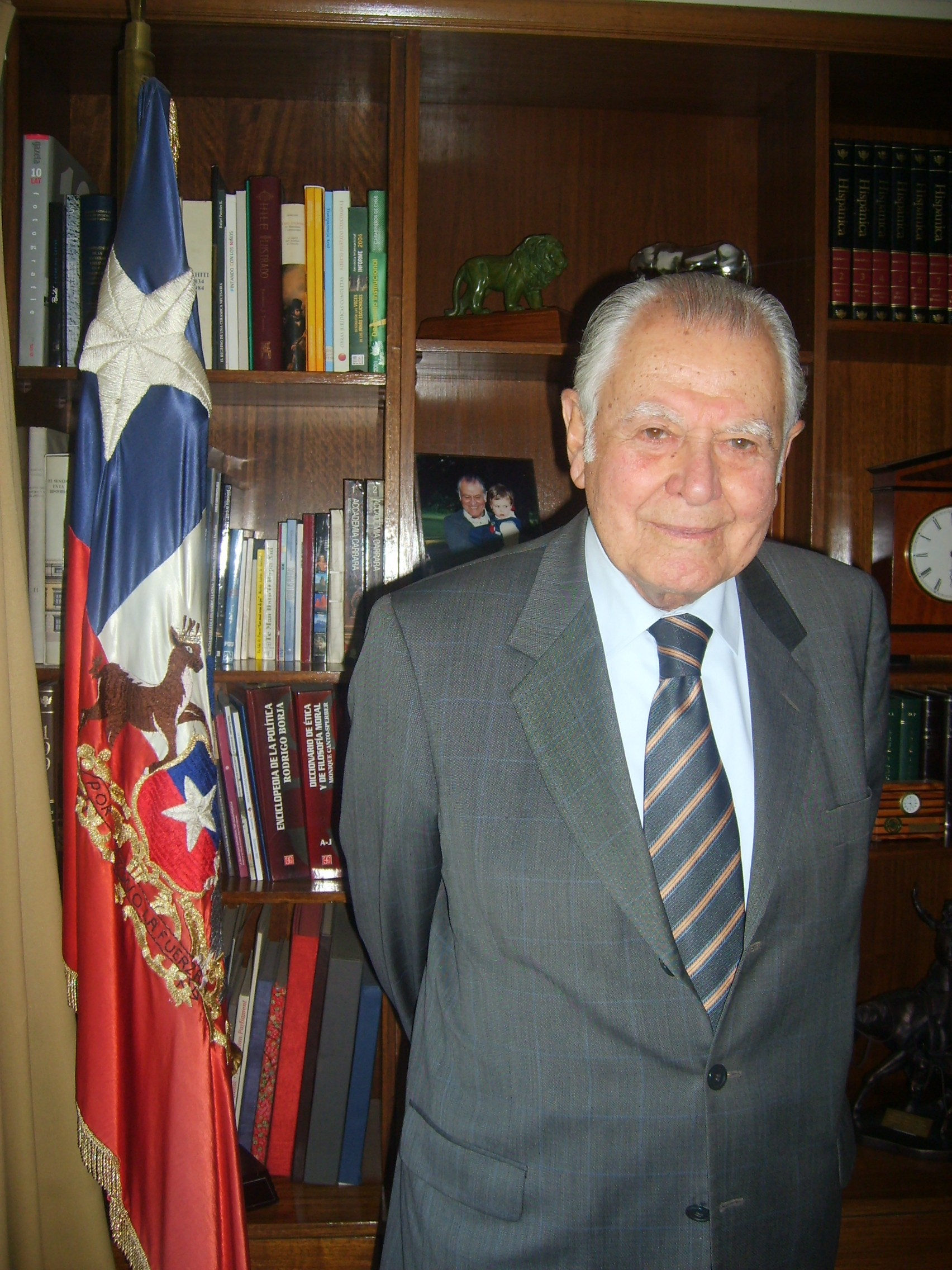 Fotografía de Don Patricio Aylwin obtenida en su oficina particular